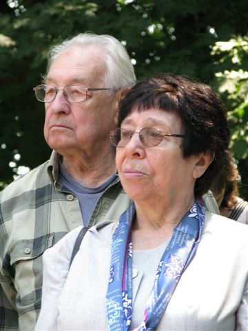 Andrzej Wajda (1926-2016), Polish film director and Joanna Olczak-Ronikier (b. 1934), Polish writer